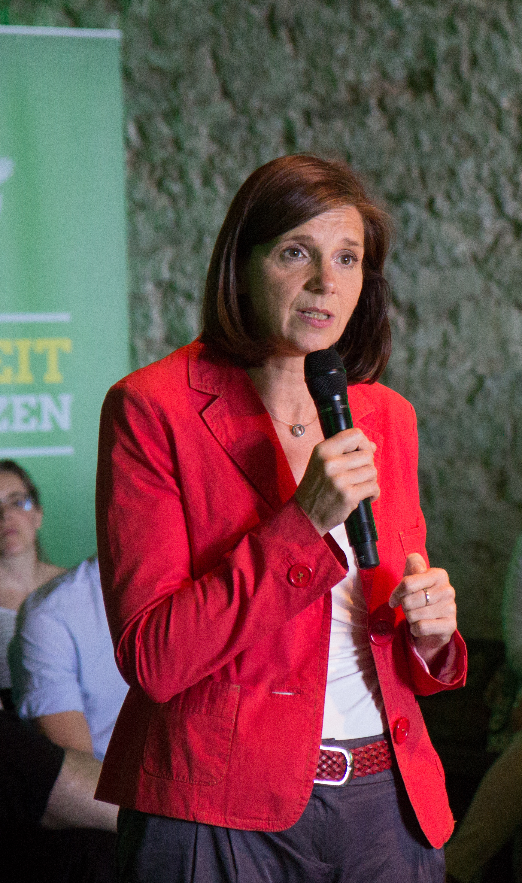 Katrin Göring-Eckardt. Veranstaltung "Drüber Reden" am 31. Mai 2017 in Mainz. Moderation Tabea Rößner (MdB).